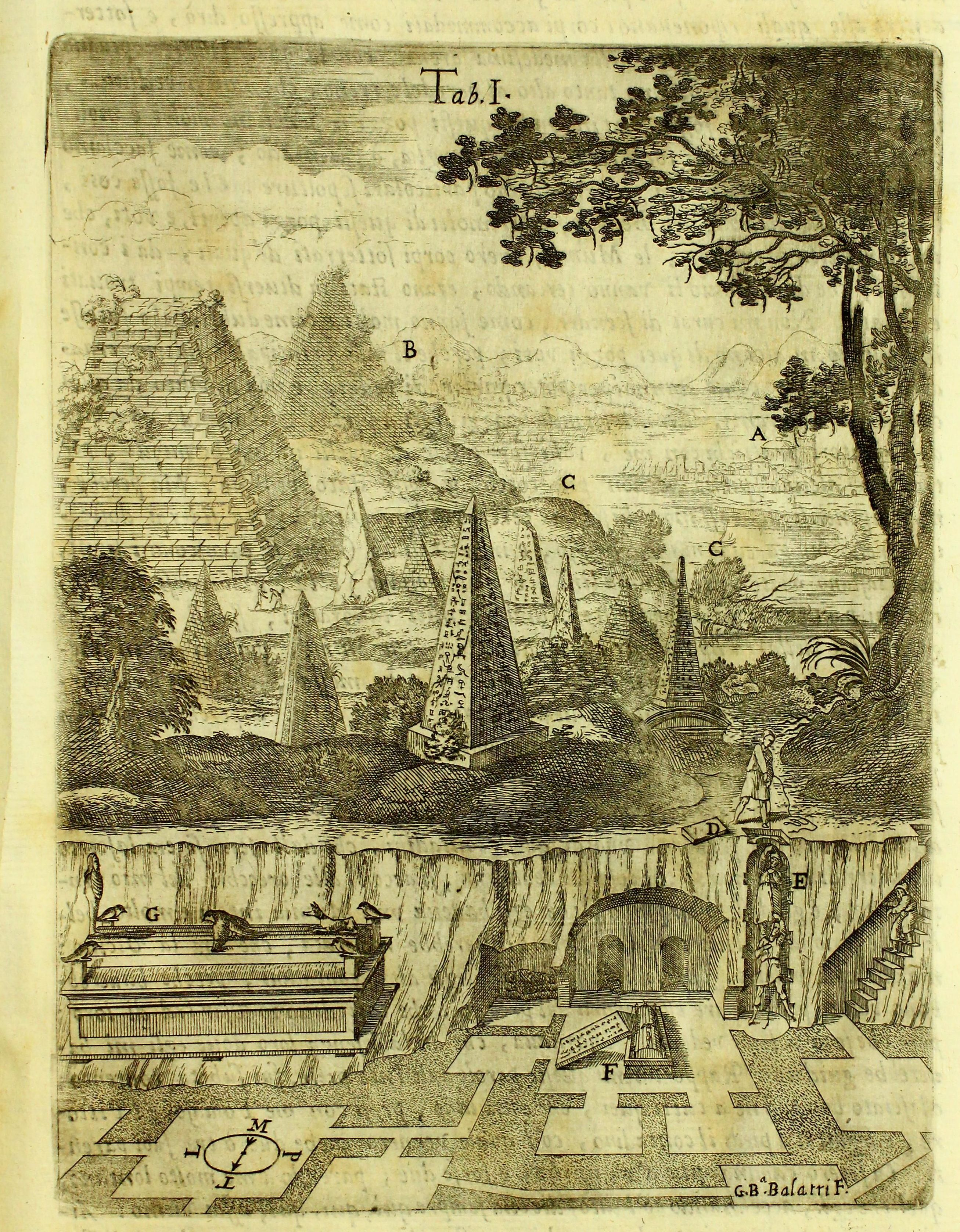 Autor: Kircher, Athanasius, (S.I.), 1602-1680 Descripción bibliográfica: Athanasii Kircheri, Soc. Iesu, Oedipi Aegyptiaci Tomus III :theatrum hieroglyphicum, hoc est, noua & hucusque intentata obeliscorum coetorumque hieroglyphicorum monumentorum... interpretatio... - Romae : ex typographia Vitalis Mascardi..., 1654 (1655) . - [2], 590, [36] p. : il. ; Fol. Materia: Egipto - Escritura jeroglífica - Obras anteriores a 1800 Notas: Segunda fecha entre paréntesis consta en colofón. - Sign: A-4I4, 4K2 Impresor: Mascardi, Vitale Lugar de impresión: Italia. Roma Localización: Vea la ilustración en su contexto Libro completo en pdf